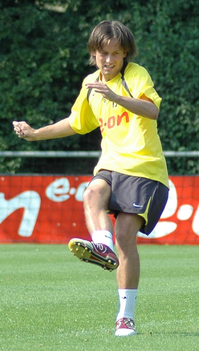 Tomas Rosicky beim Training am "Rabenloh"